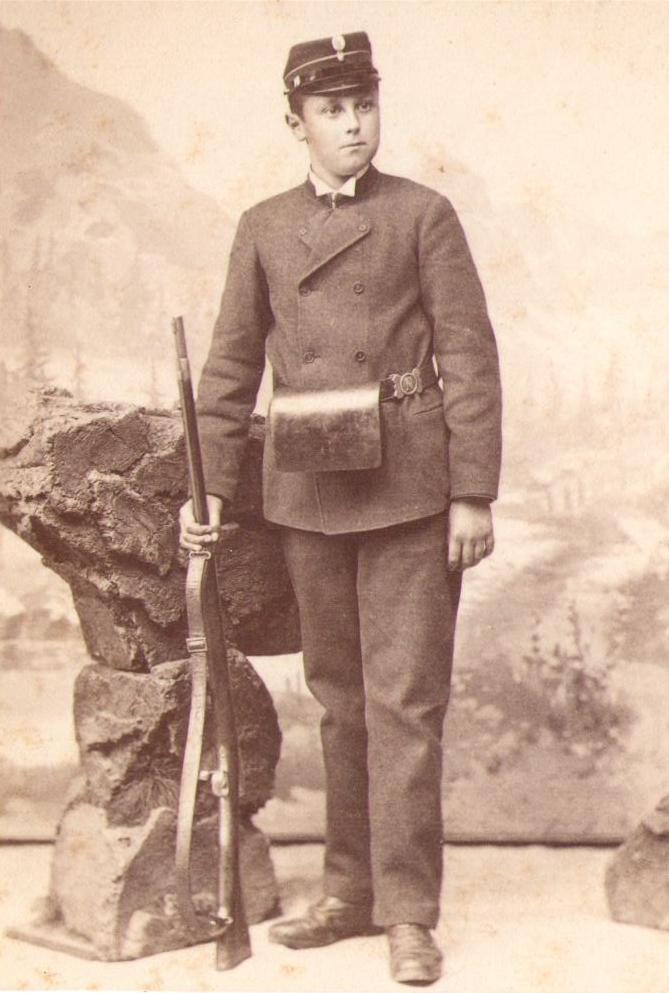 Photo de 1880 du cadet zurichois Oscar Beyer. Photographe A. Meier von Tobel Rennweg 4 à Zurich